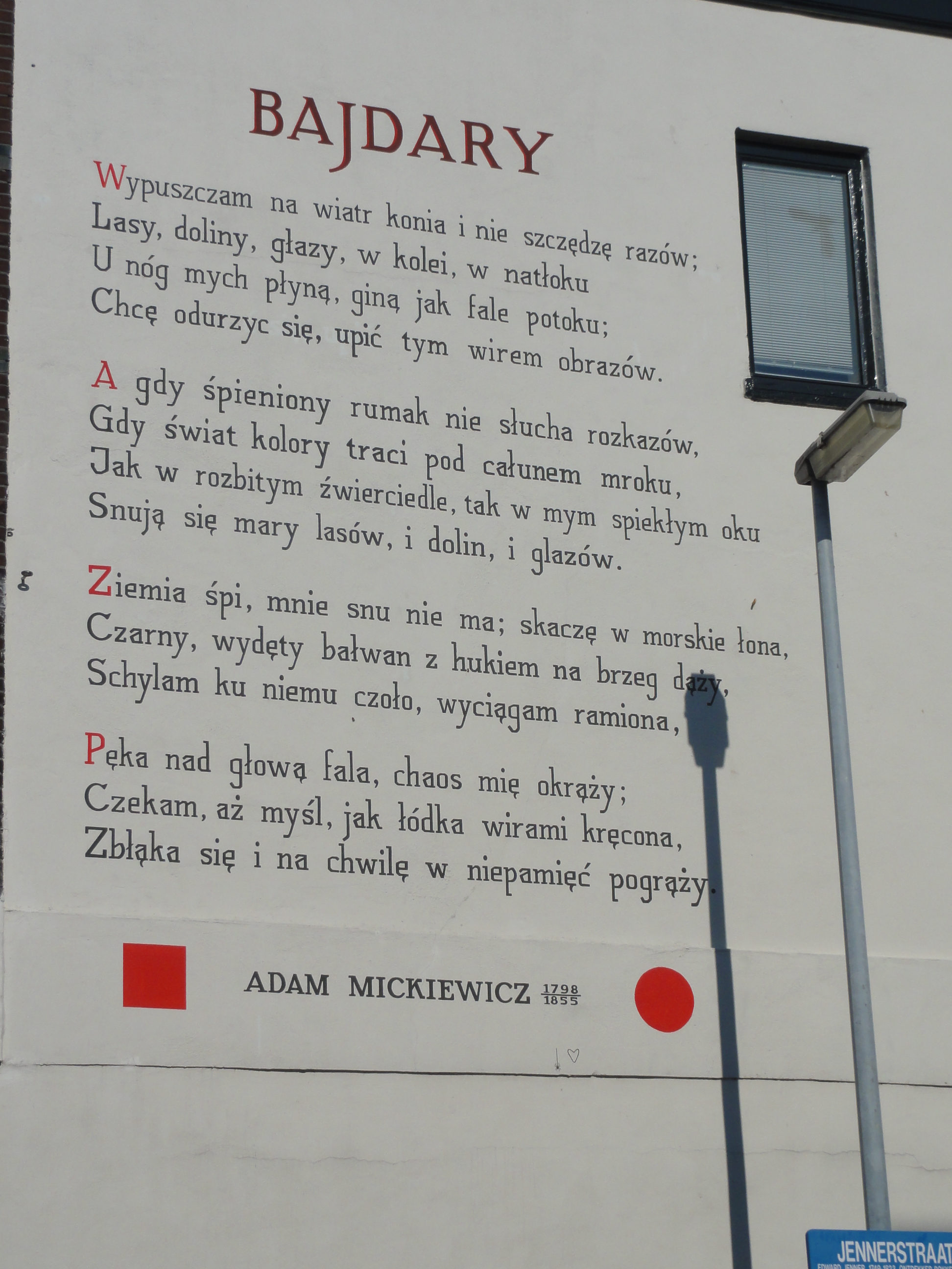 Het muurgedicht van Adam Mickiewicz met als titel Bajdary - Het Dal van Bajdaar werd in de zomer van 2011 opnieuw aangebracht door de stichting Tegen-Beeld aan de Haarlemmerweg 5a, Leiden